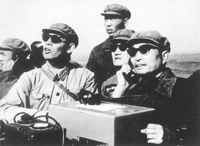 中文（中国大陆）: 1964年10月16日，中国第一颗原子弹爆炸后，张爱萍在现场向周恩来报告中文（台灣）: 1964年10月16日，中國大陸第一颗原子彈爆炸後，張愛萍(右一)在现場向周恩來報告